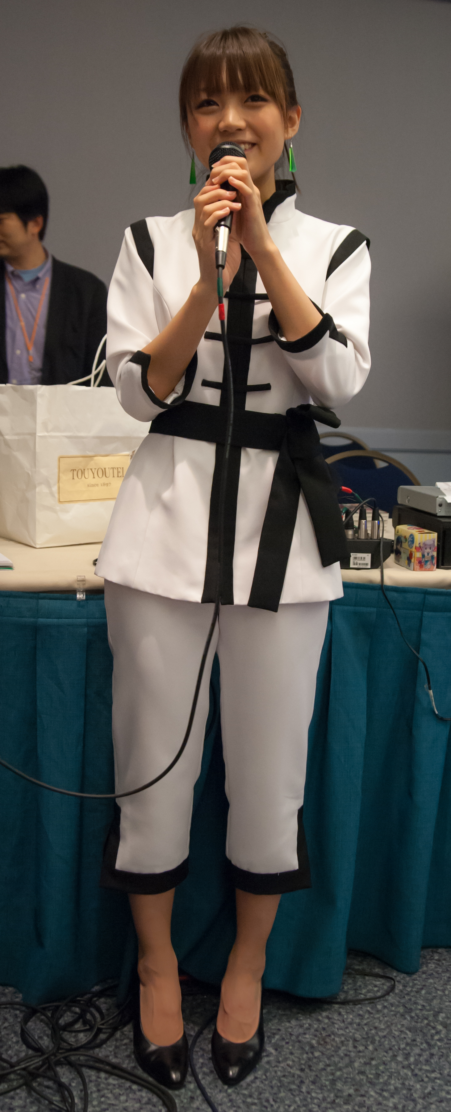 Suzuko Mimori at AWA 2012.